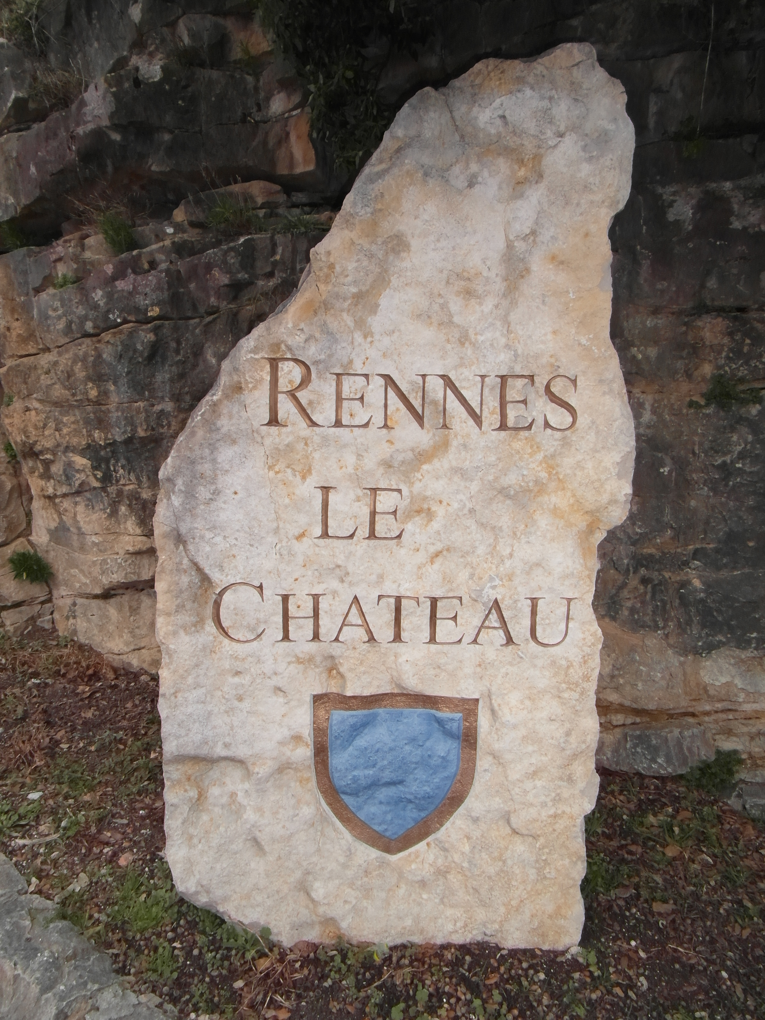 Panneau de Rennes le chateau